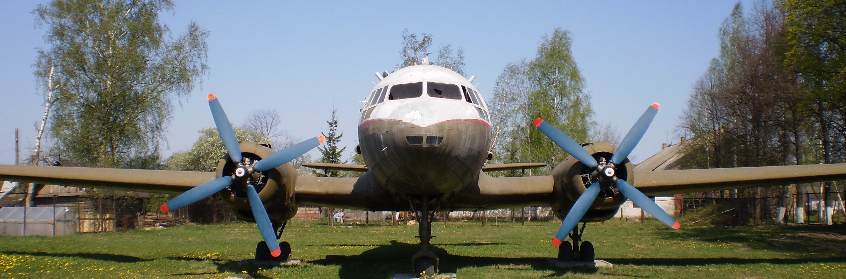 Бегомльский самолет